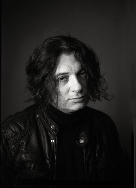 Вадим Самойлов/Группа "Агата Кристи".